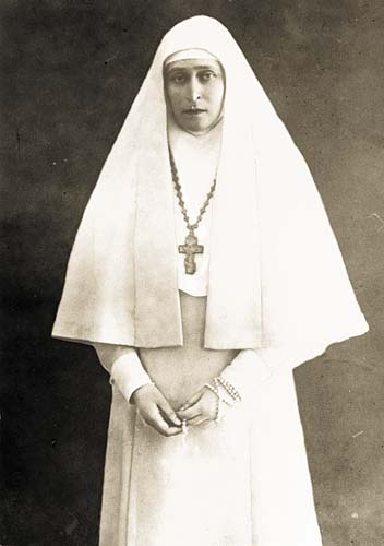 Elisabeth ("Ella") Alexandra Luise Alice (1 november 1864 – 18 juli 1918), na haar huwelijk Elisabeth Fjodorovna, was de tweede dochter van groothertog Lodewijk IV van Hessen-Darmstadt en prinses Alice, de tweede dochter van koningin Victoria van het Verenigd Koninkrijk. Elisabeth was ook de oudere zus van prinses Alice, die trouwde met tsaar Nicolaas II van Rusland.